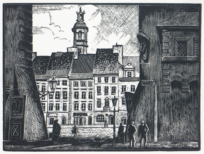 Stare Miasto w Warszawie